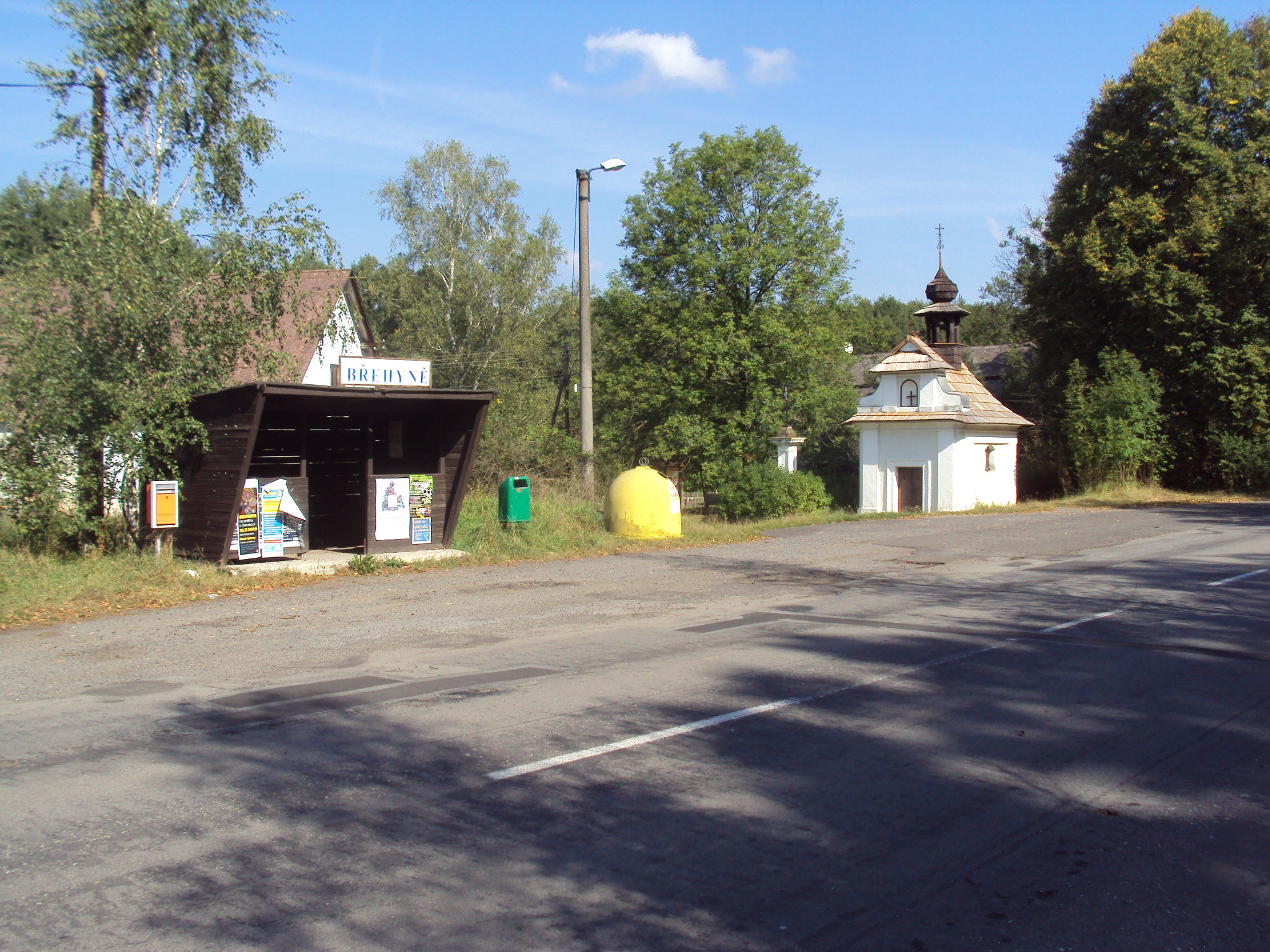 Břehyně autobusová zastávka, vzadu památkově chráněná kaple sv. Vavřince